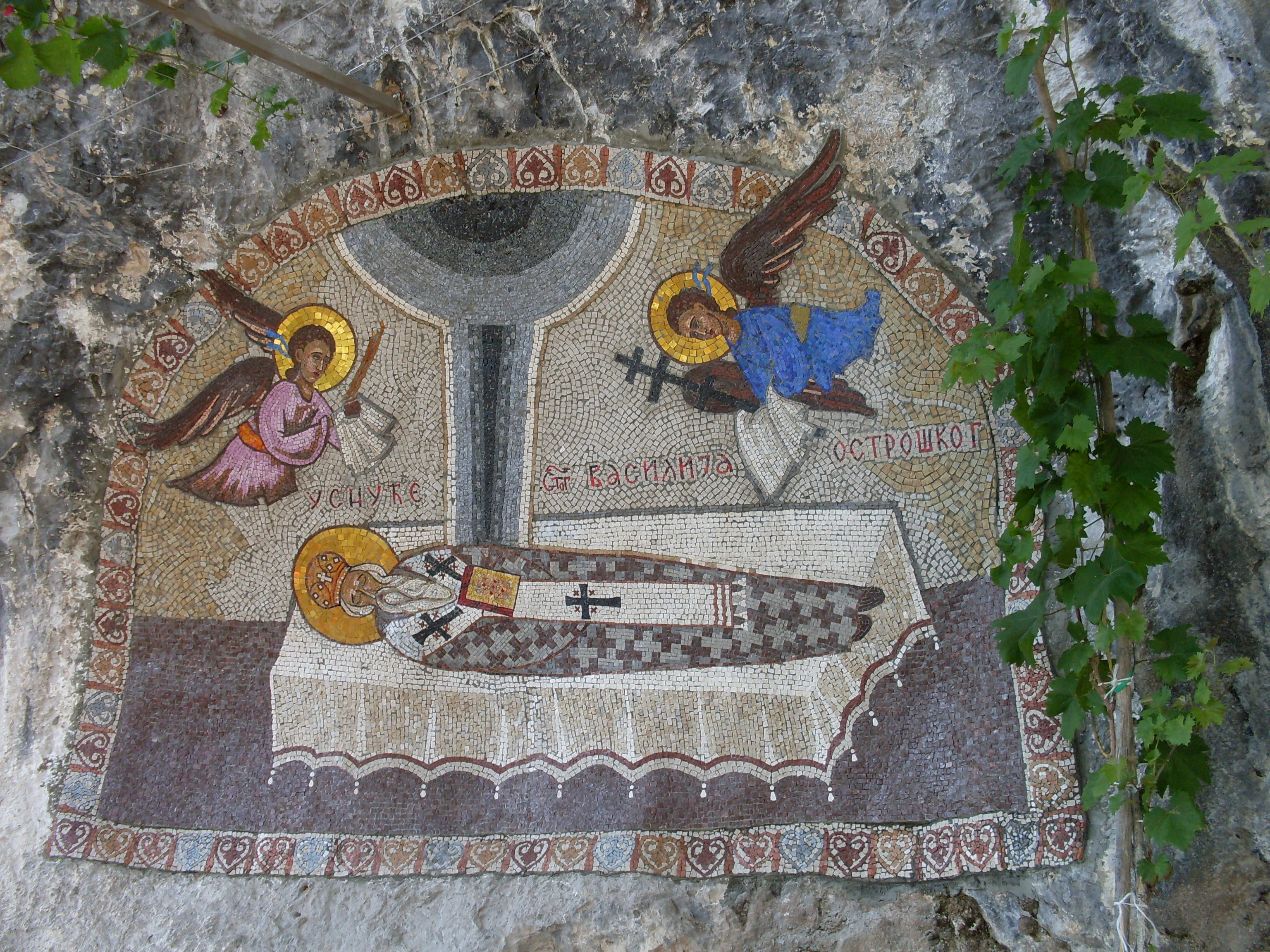 Мозаика в монастыре "Острог".